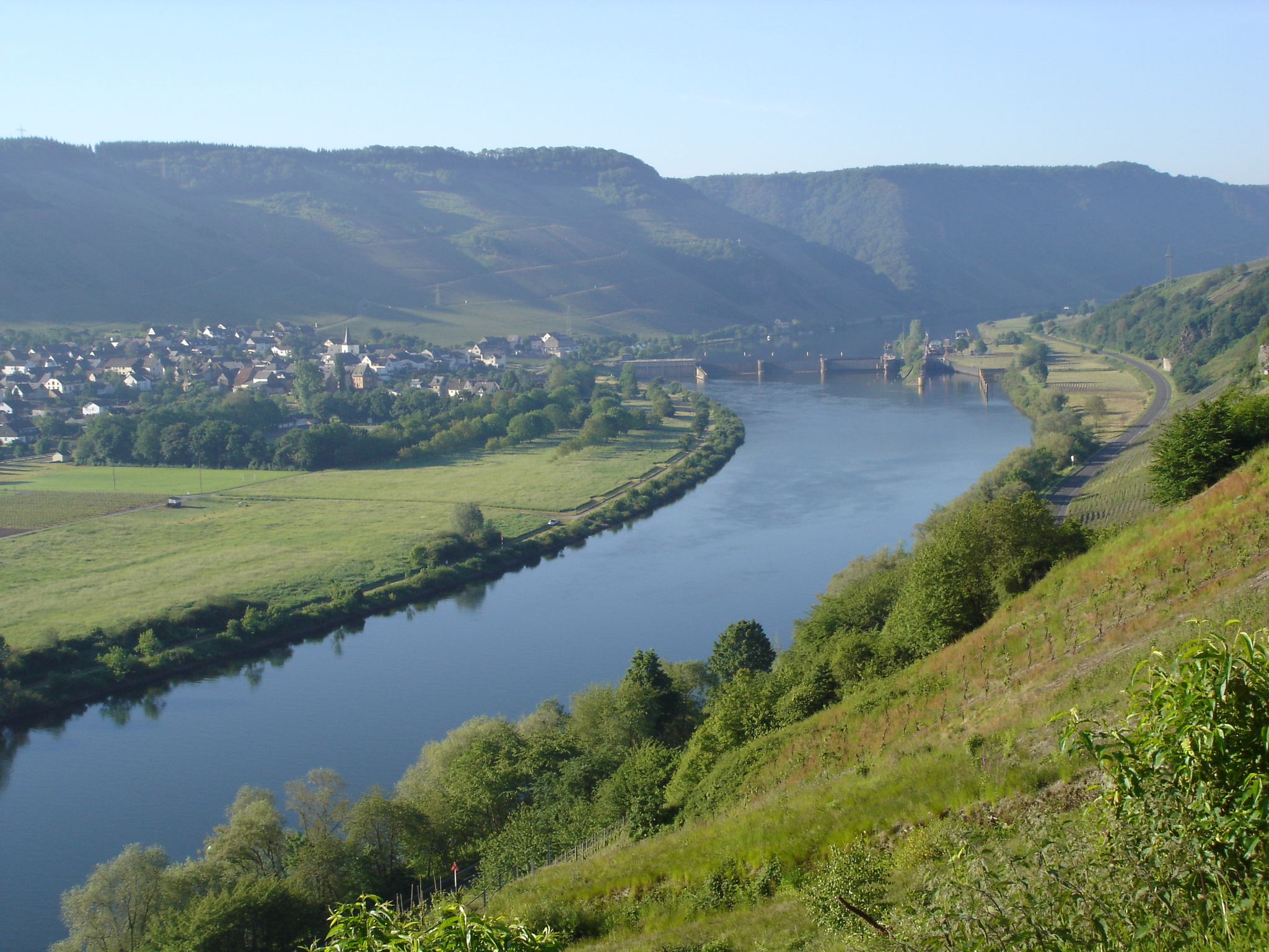 Wintrich von der gegenüberliegenden Moselseite